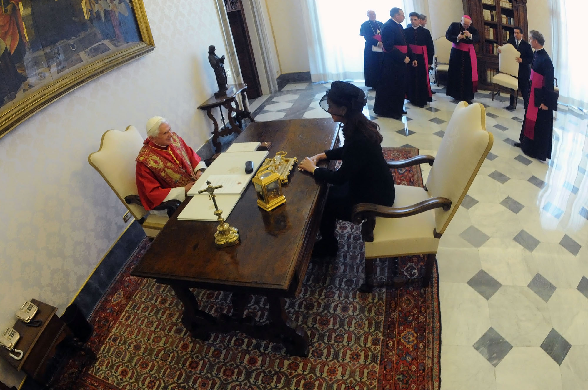 La presidenta Cristina Fernández durante su reunión con Benedicto XVI